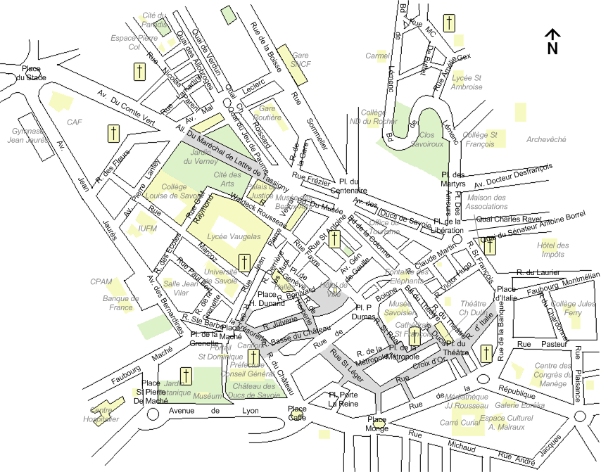 Plan du Centre de Chambéry (France)